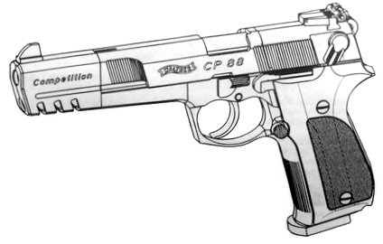 Zeichnung der Walther CP 88 "Competition"